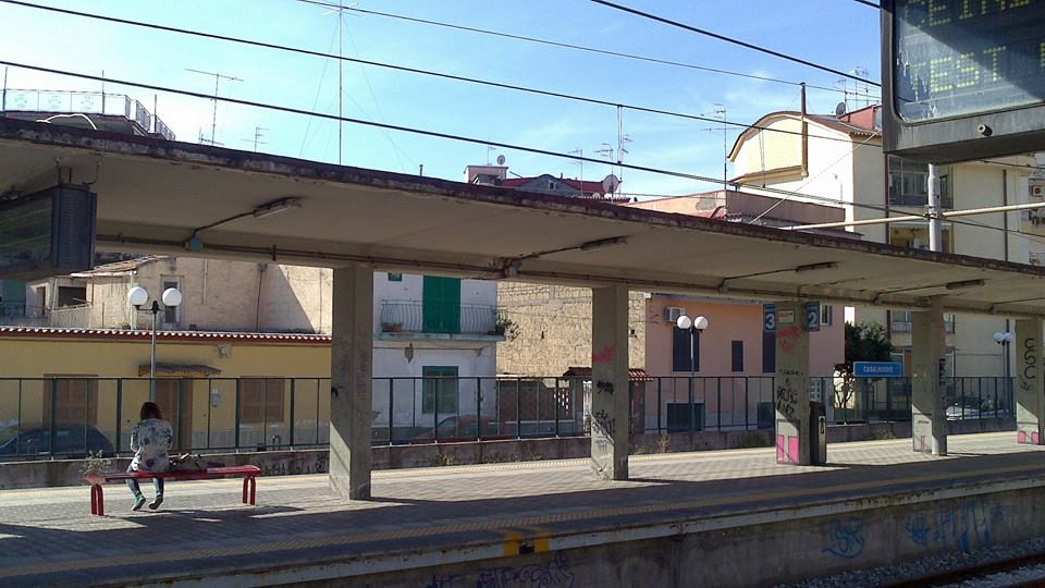 Banchina dei binari 2 e 3 della stazione di Casalnuovo